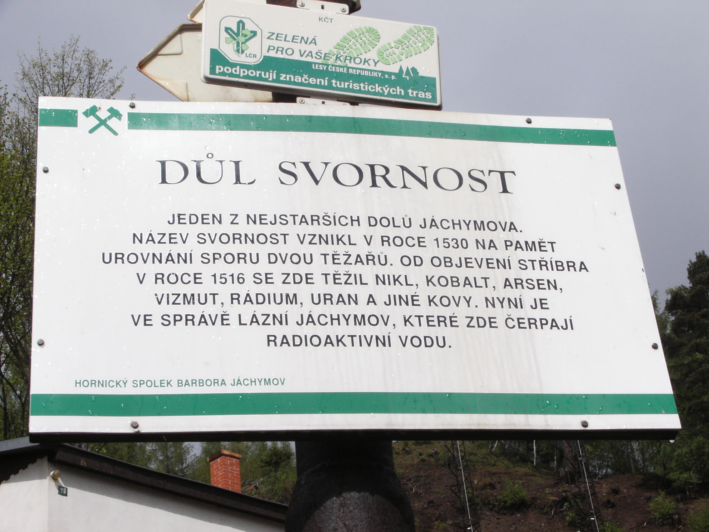 Informační tabule u tábora Svornost